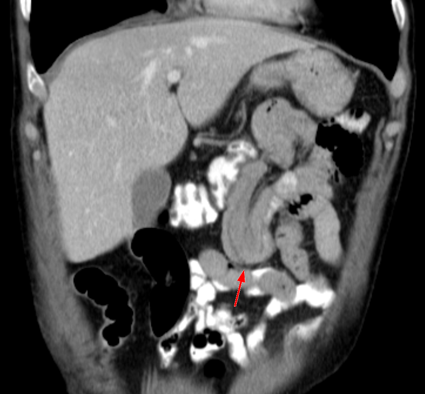 Dünndarminvagination in der Computertomographie: Coronare Rekonstruktion.